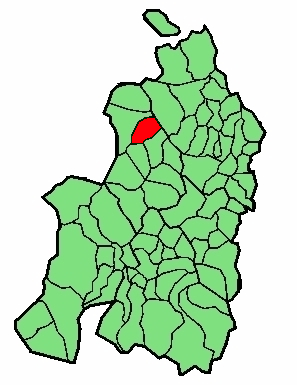 aipaturiko udalerriaren kokapena Nafarroa Beherean